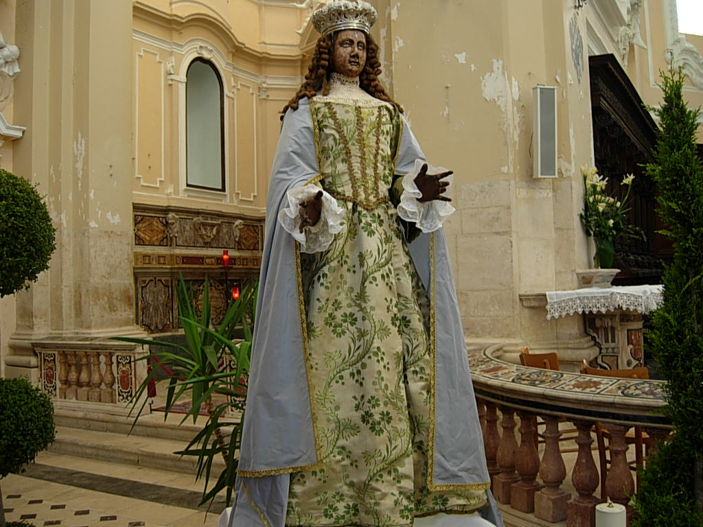 Madonna - Complesso SS. Annunziata in Sulmona (AQ) Foto personale